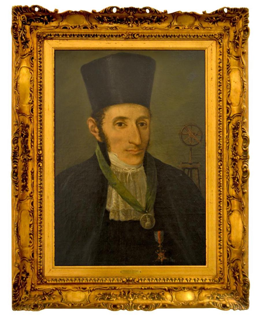 ritratto di Federigo Zuccari